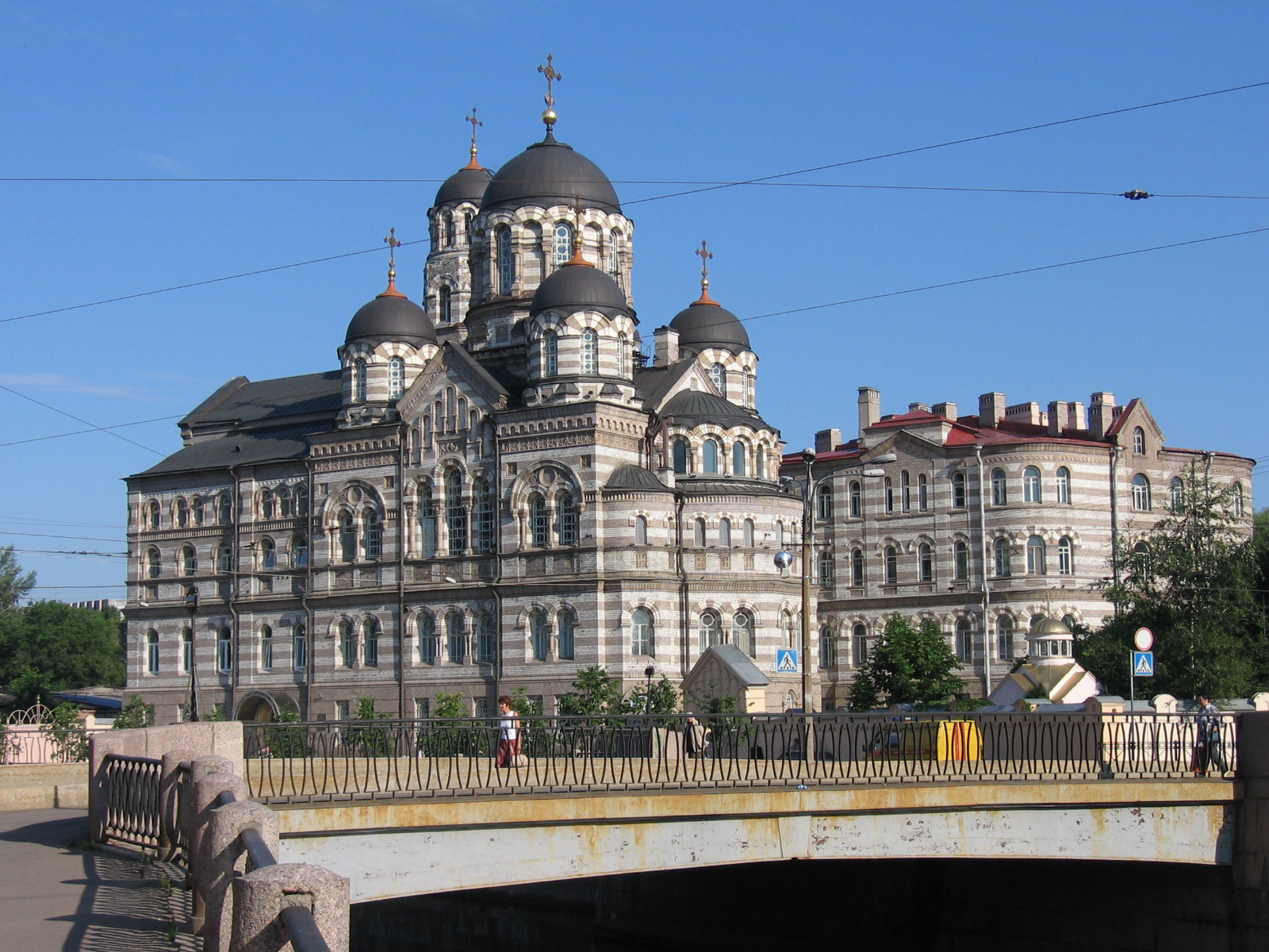 Монастырь пр.Иоанна Кронштадского